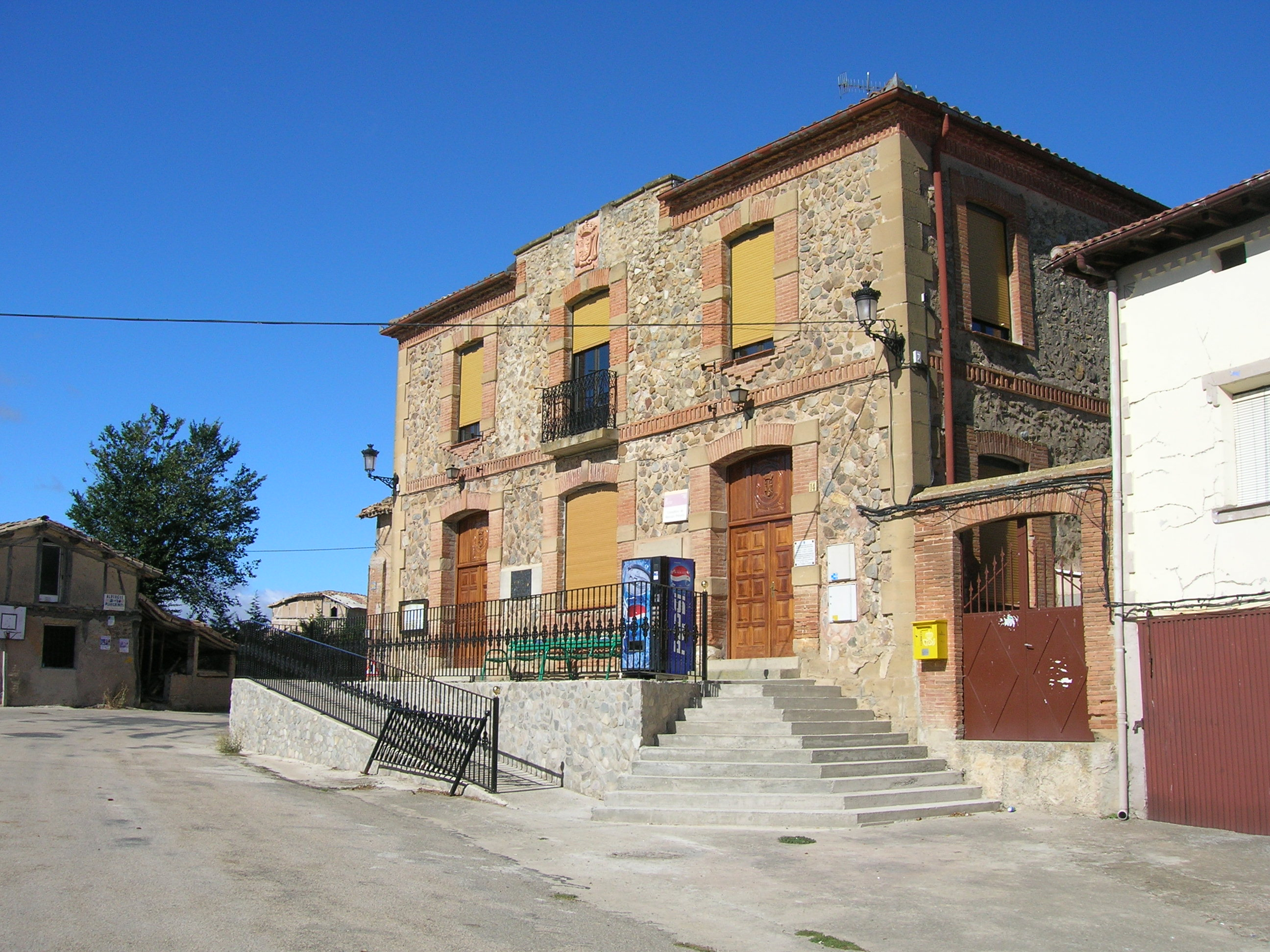 Antigua casona en Viloria de Rioja, Burgos, España.